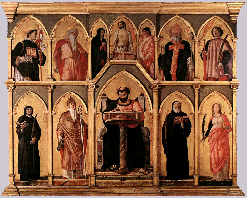 Plusieurs panneaux représentent des saints bénédictins dont le choix est directement lié aux reliques conservés dans cette église depuis sa fondation : Daniel de Padoue (saint-patron de la ville), Jérôme, Maxime (évêque de Padoue), Julien, Luc, Félicité de Padoue, Prosdocime (saint-patron de Padoue), Benoît, Justine de Padoue2,1, avec un Christ de douleur, la Vierge et Jean, témoins directs de la Passion du Christ.